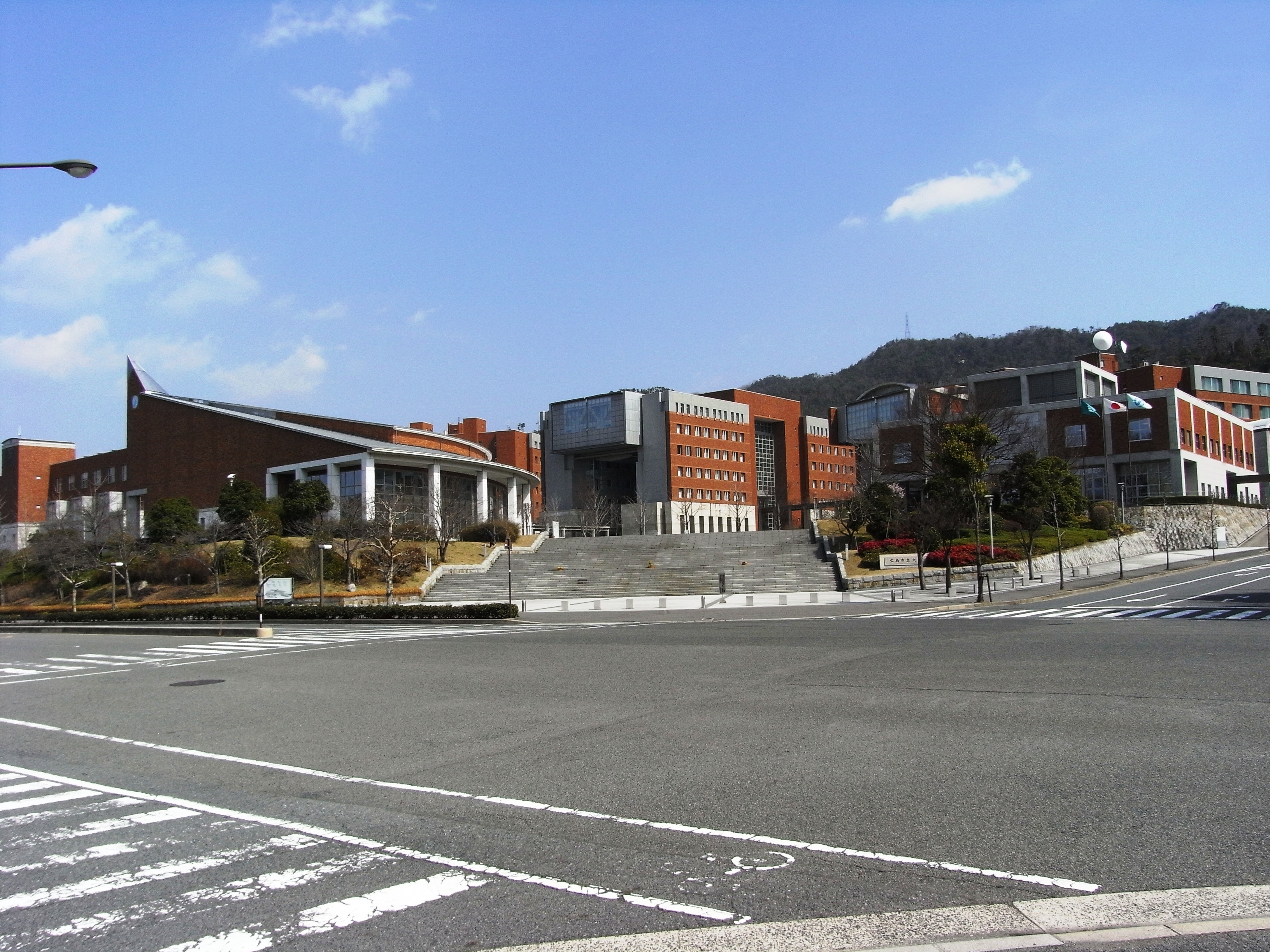 2009年3月10日、本人撮影。広島市立大学。